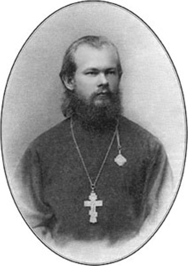 протоиерей Александр Зверев, будущий архиепископ Сергий (Зверев)